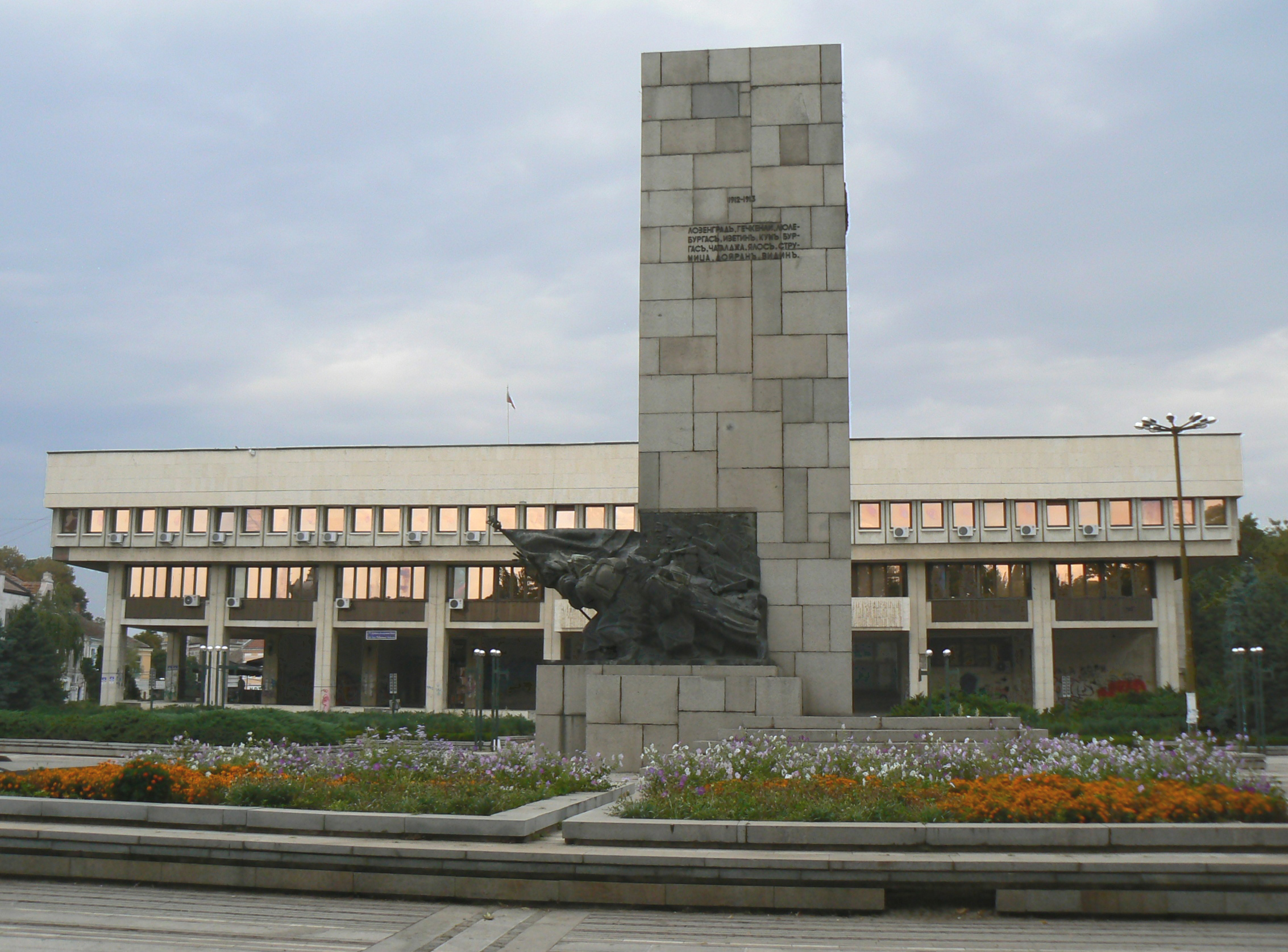 "Bdintsi" central square, the Monument to the fallen for the country and the Philharmonic orchestra building